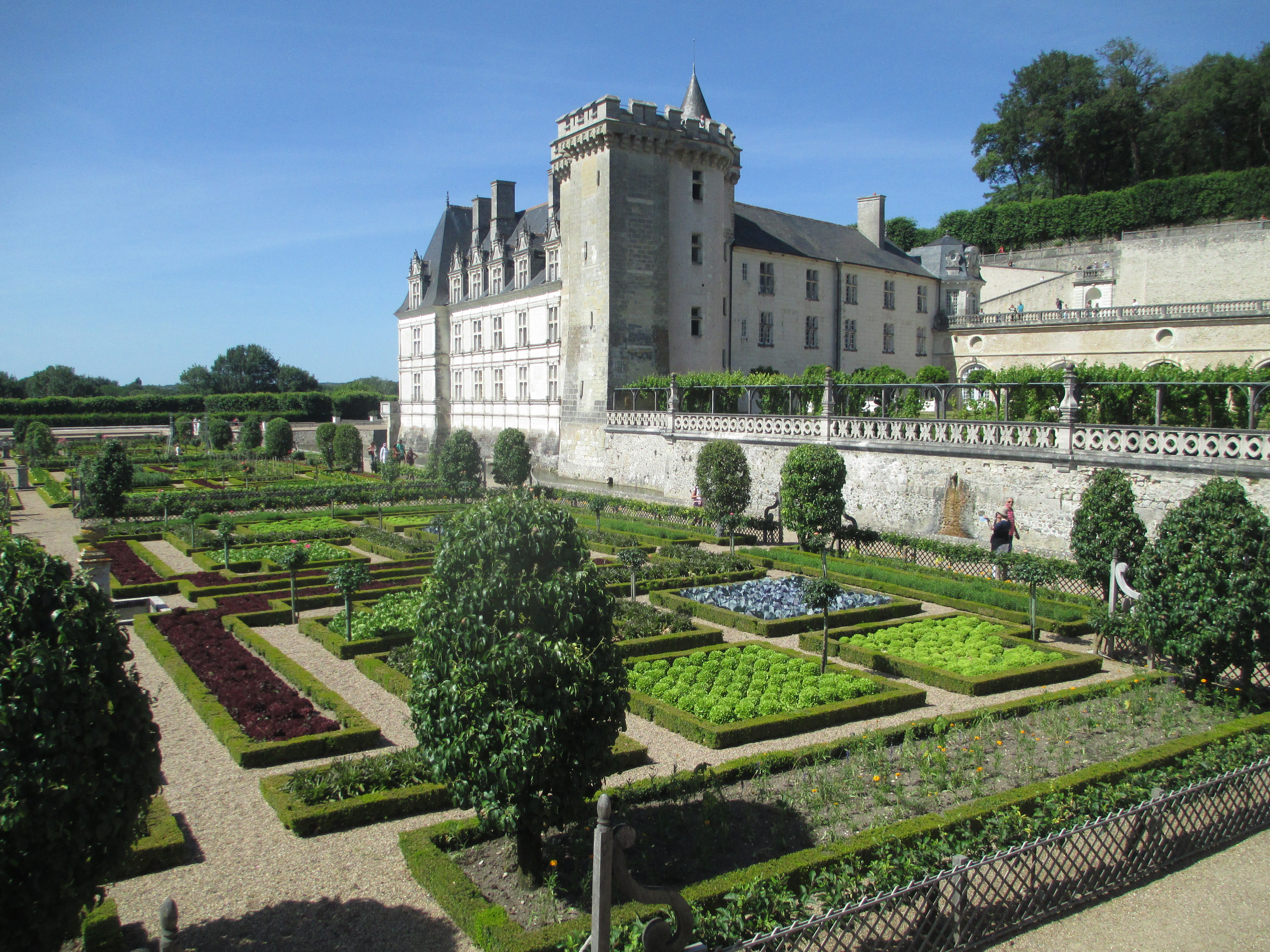 גני טירת וילנדרי